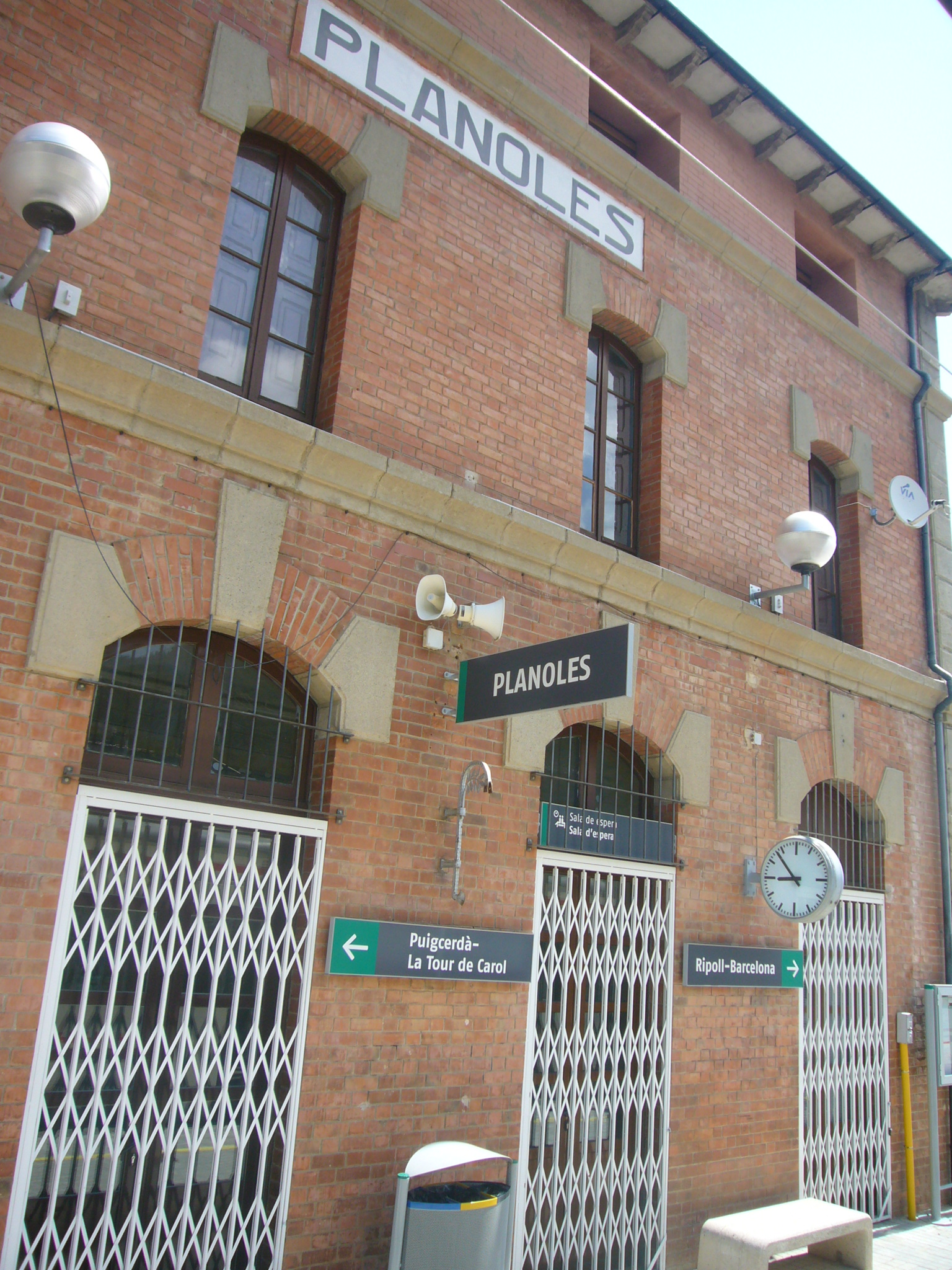 Estació de tren - Planoles